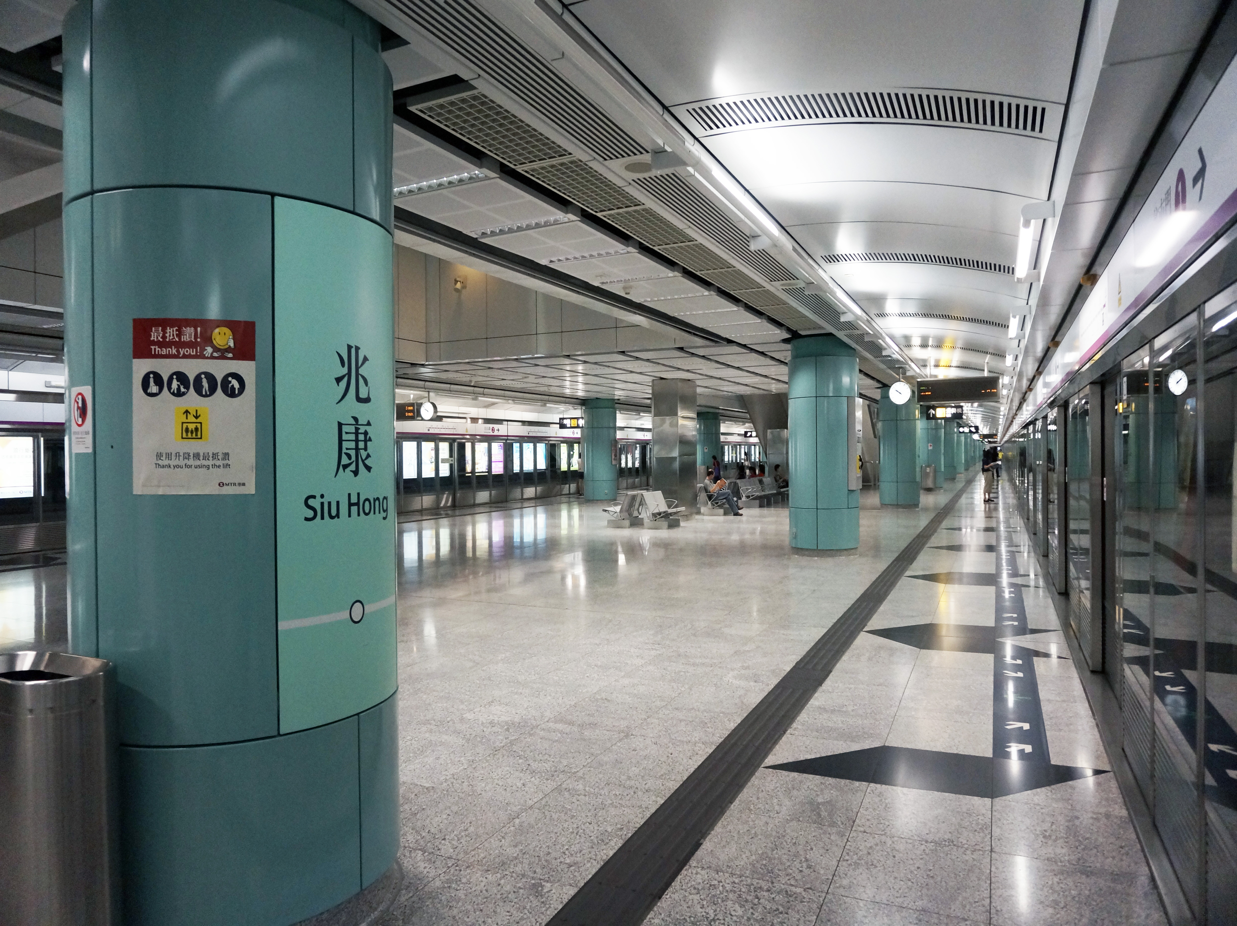 港鐵兆康站月台